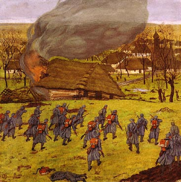 Alfred Basel, Erstürmung des Dorfes Stary Korczyn durch das Landsturminfanterieregiment Nr. 1, 22. Dez. 1914